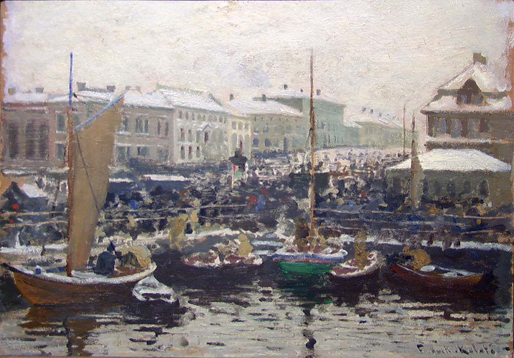 Fredrik Kolstø: Gemälde Fischmarkt in Bergen (1881) im Nationalmuseum Oslo.